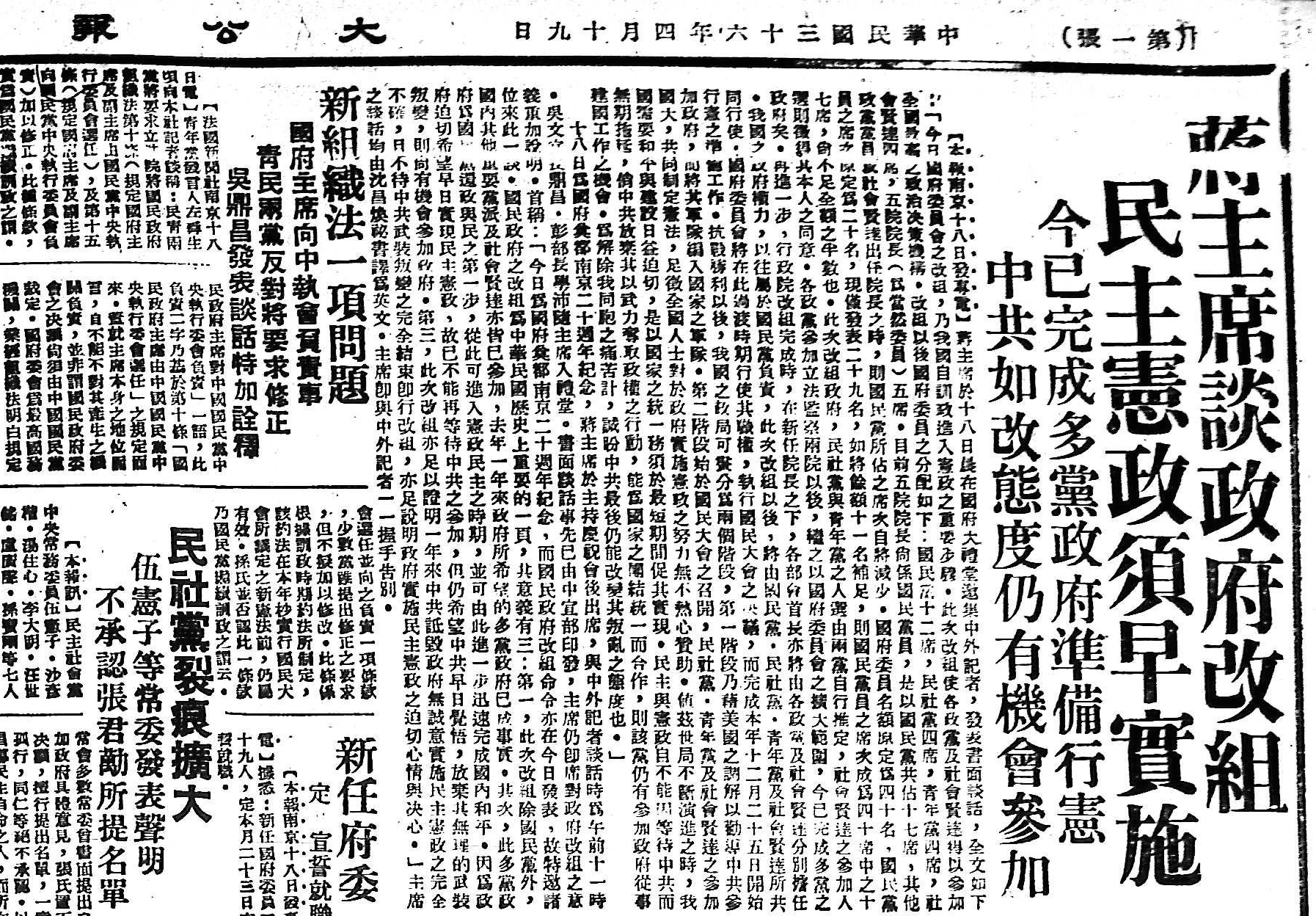 中文（中国大陆）: 1947年4月19日，大公报报道“国民政府改组，中共若愿回头仍有机会。”